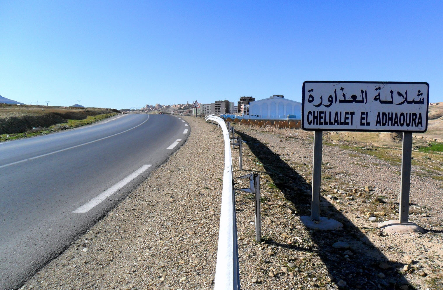 Chellalet el Adhaoura - entrée est شلالة العذاورة